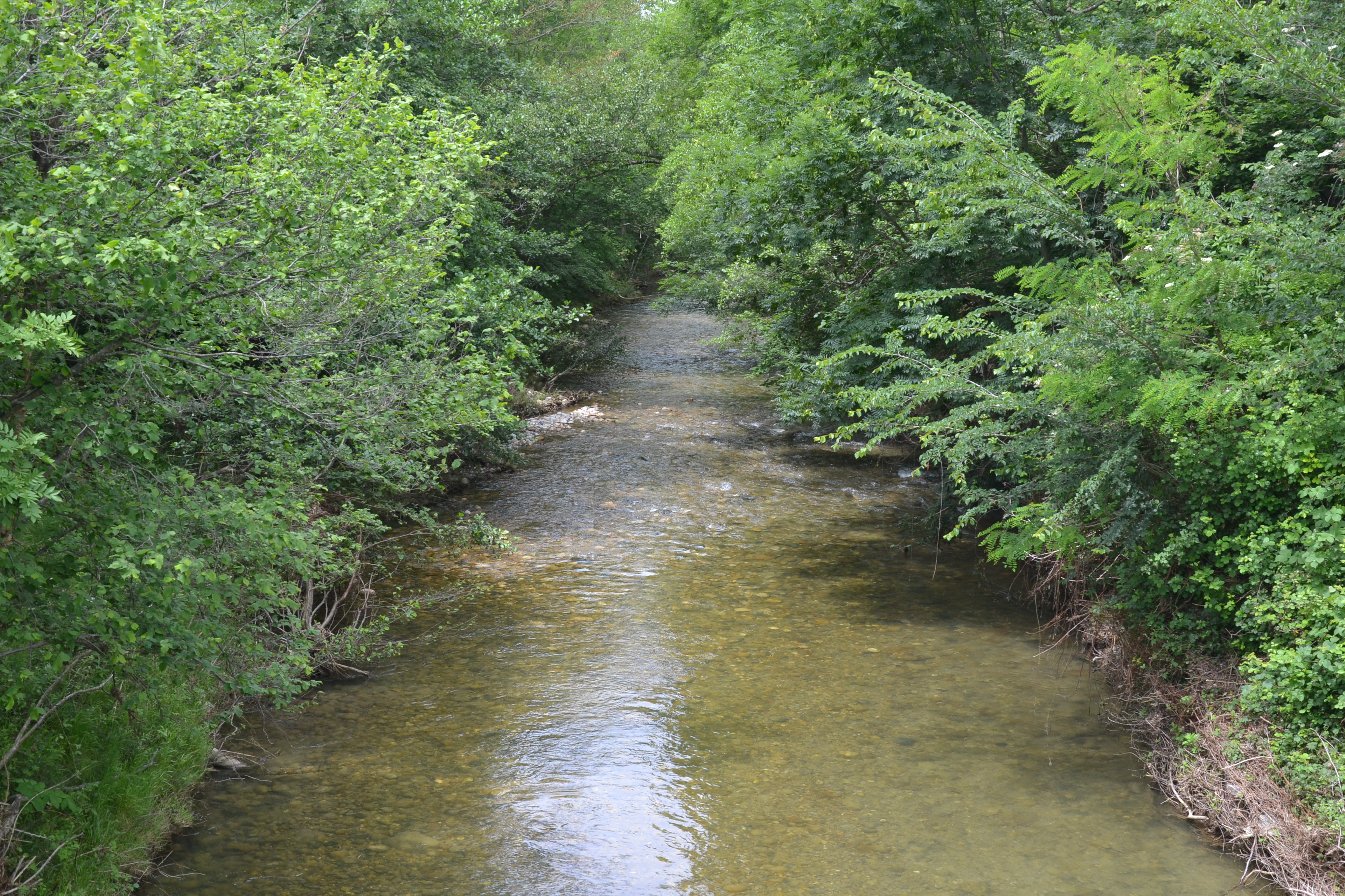 Le Douctouyre à En Bayourt (commune de Dun, Ariège, France).